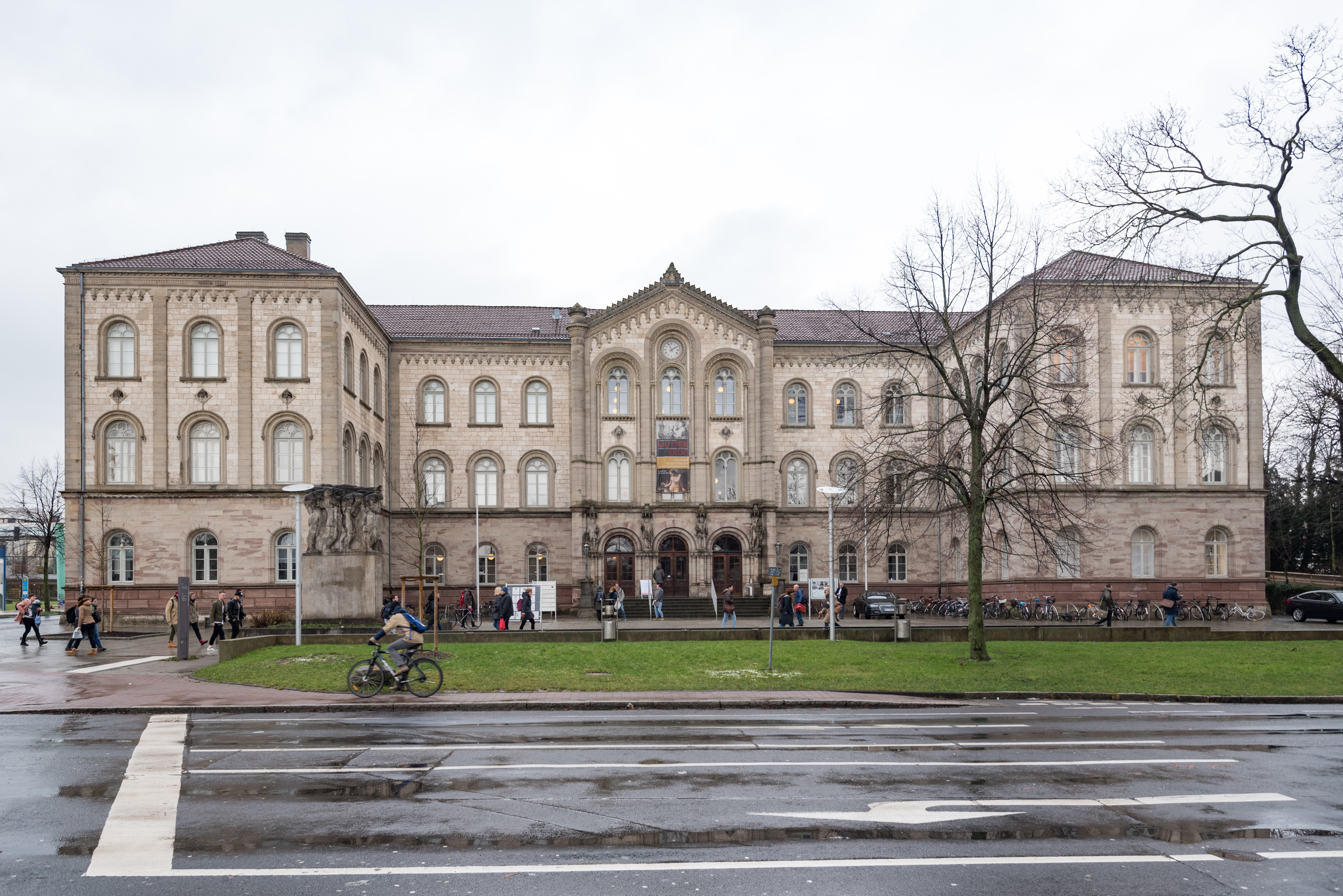 Göttingen, Weender Landstraße 2